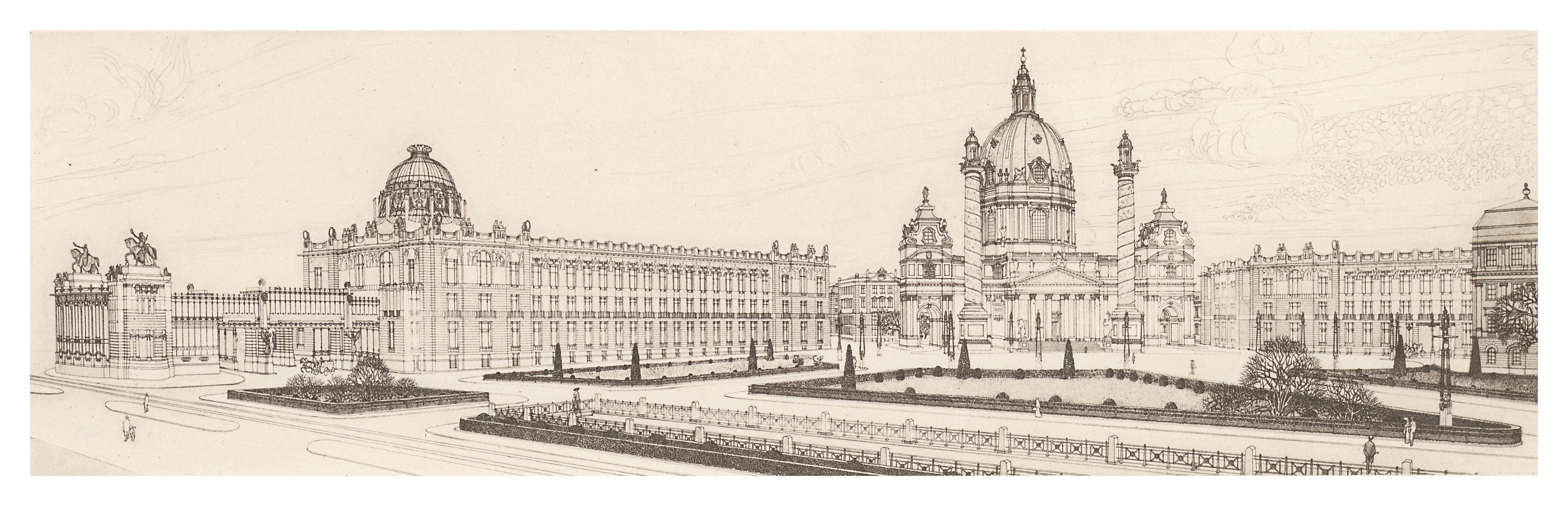 Studie Stadtmuseum Karlsplatz, Wien Bd. III Heft 5, 6, 7 Concept, not realized